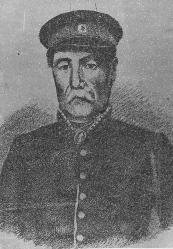 Единствената запазена снимка на Захарий Княжески, съхранявана в Регионалния исторически музей в Русе.